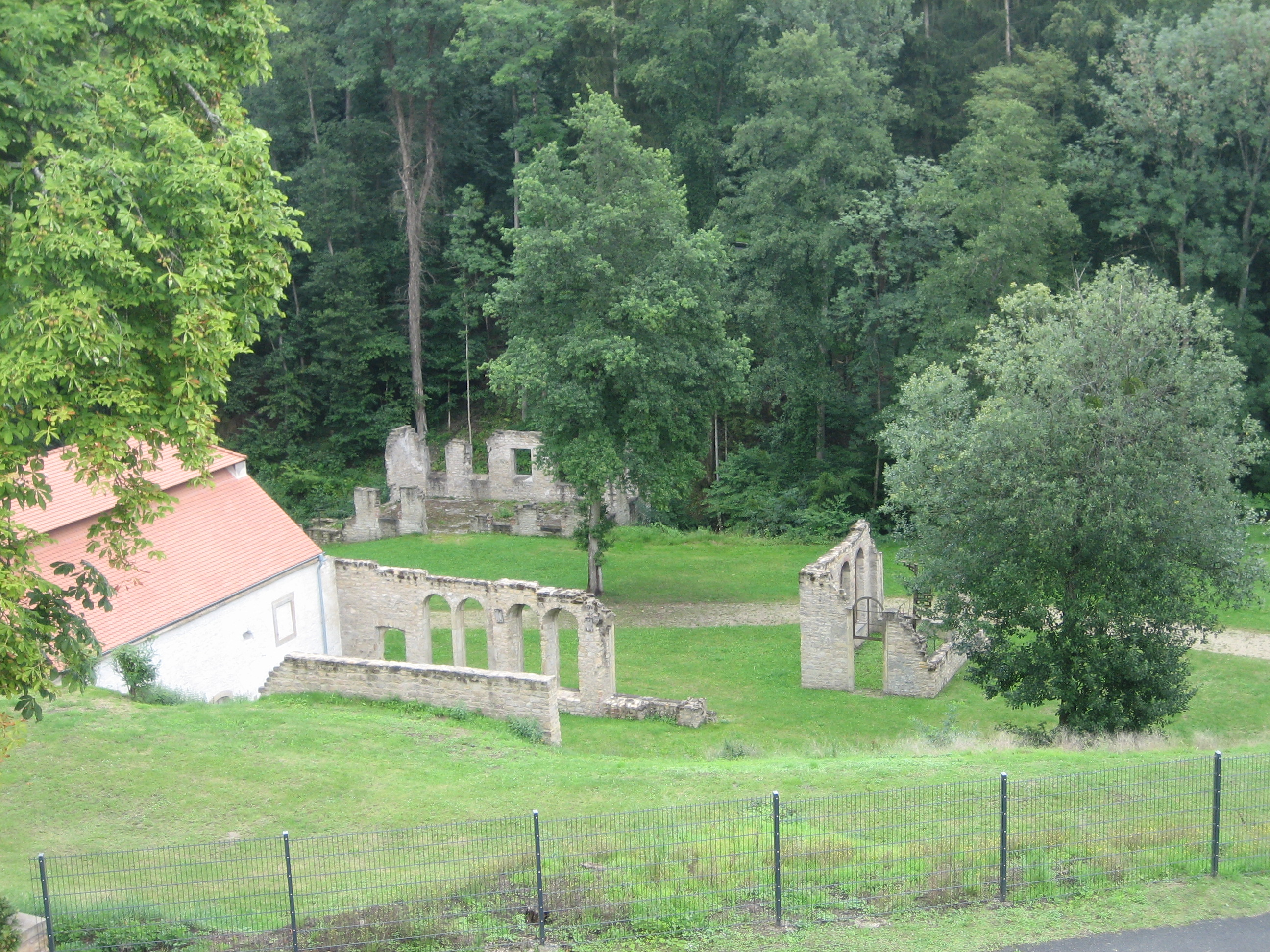 Überreste der Weilerbacher Hütte, am Schloss Weilerbach (Bollendorf).